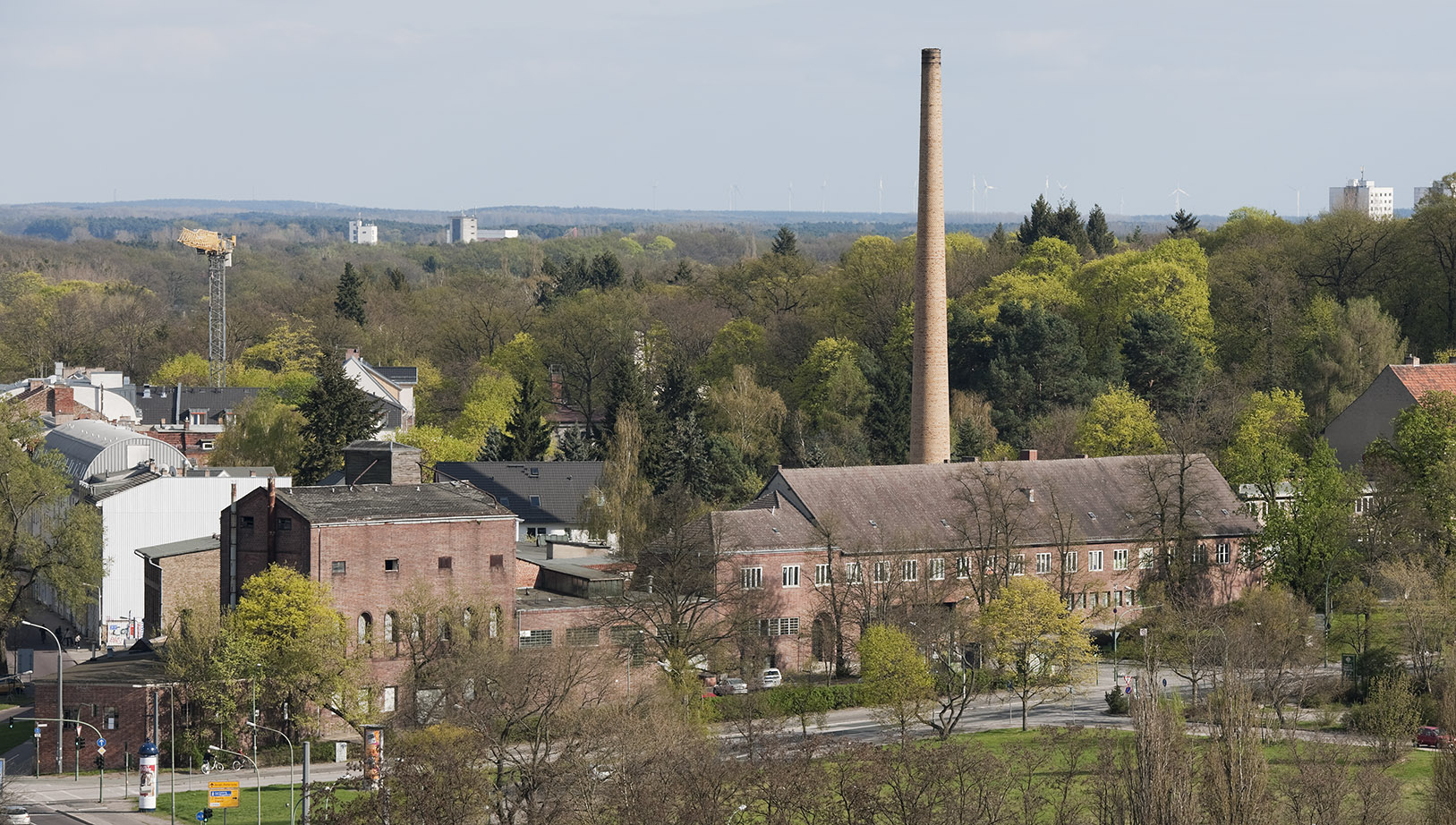 Potsdam, Albert-Einstein-Str. 1-7/Heinrich-Mann-Allee 1-3, ehem. Brauerei Gebr. Hoffmann am Brauhausberg. Gesamtansicht von Westen (ehem. Landtag).